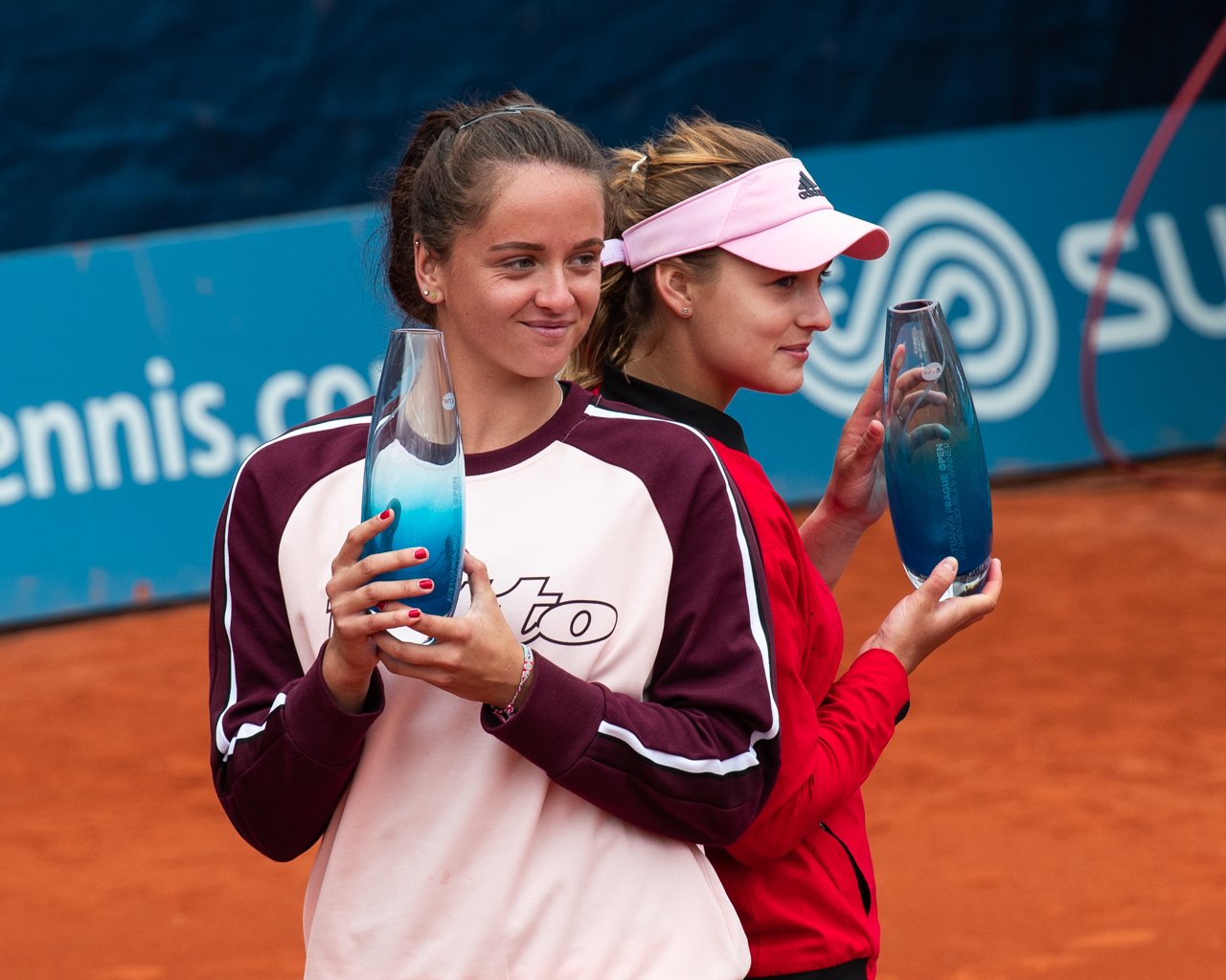 Anna Kalinskaya & Viktória Kužmová